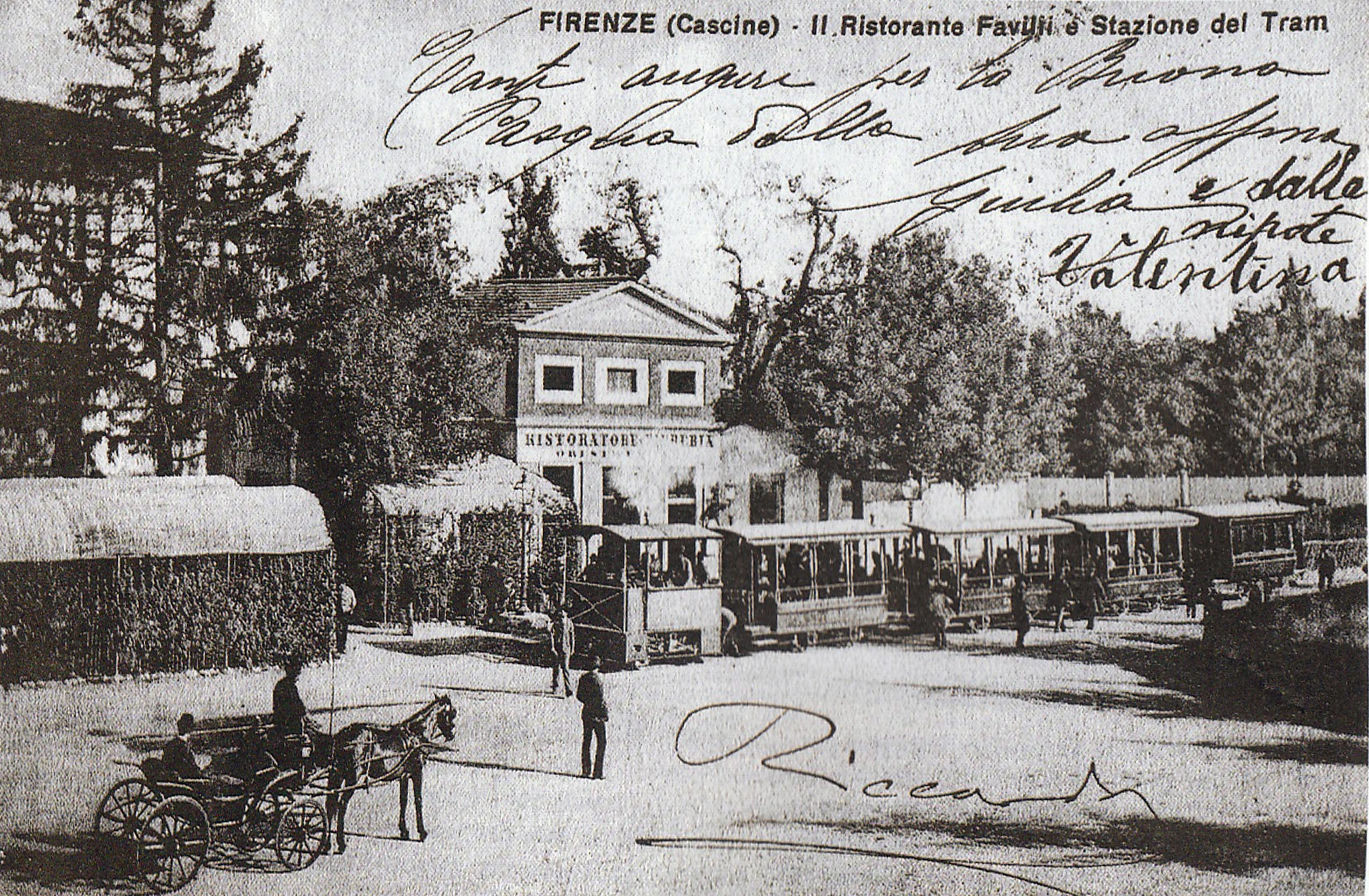 Stazione tramviaria di firenze Cascine 1890